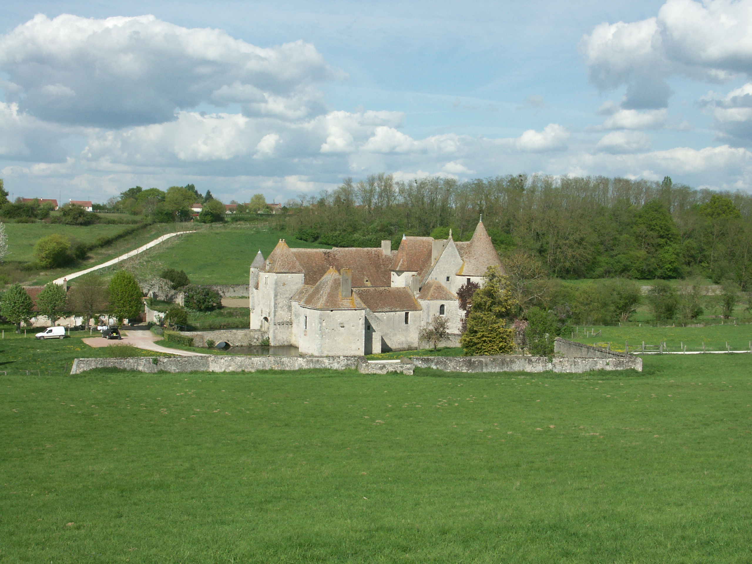 Château de Buranlure en Berry